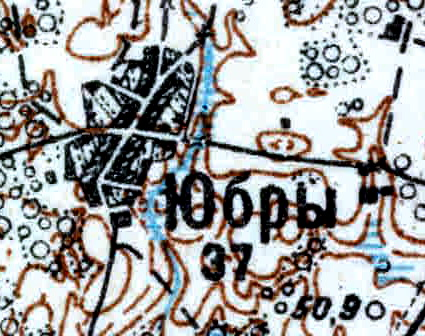 Топографическая карта Ленинградской области, квадрат VIc-28 (Луга), деревня Юбры